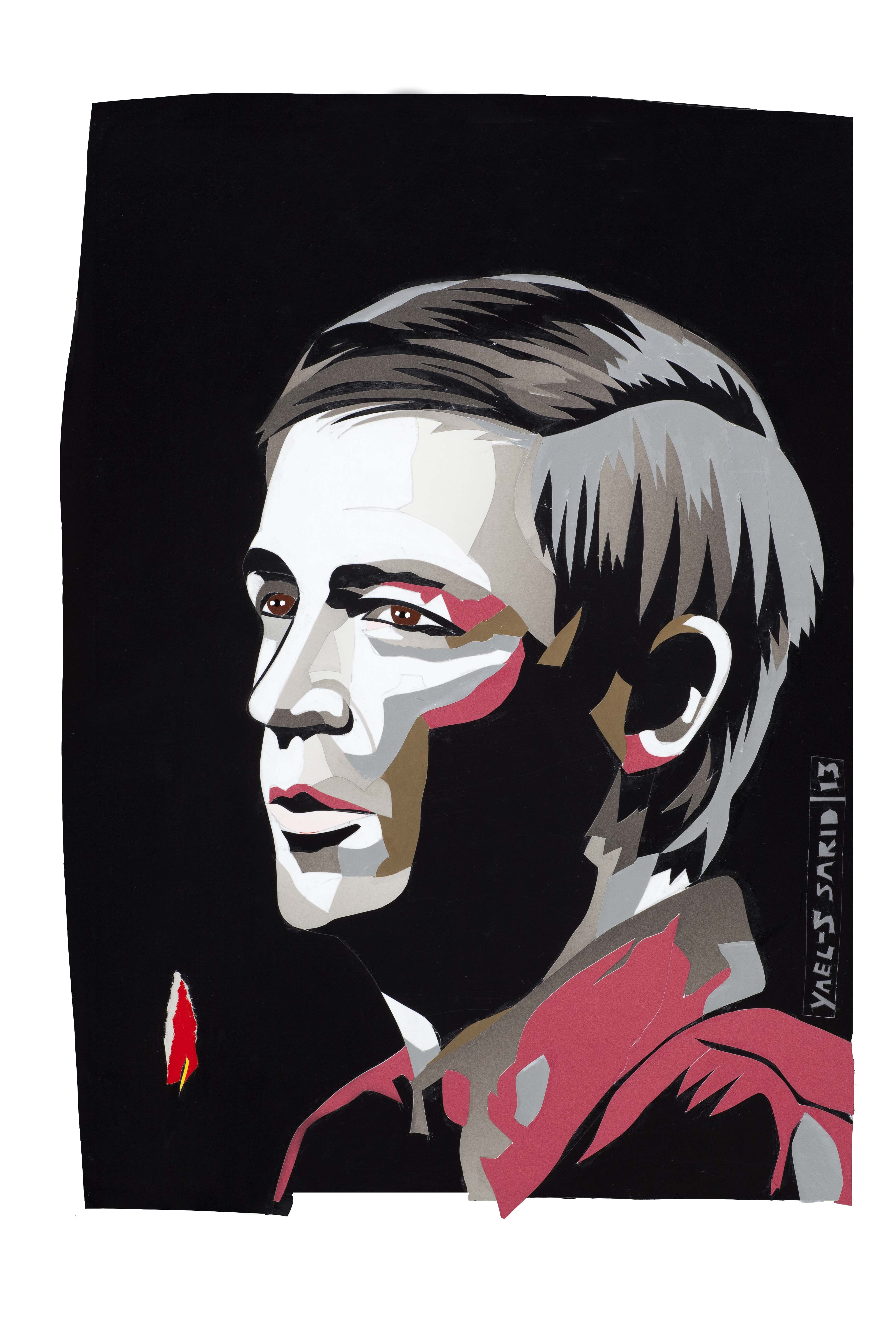 ציור רפרודוקציה של אריק איינשטיין על ידי יעל שחר שריד המבוסס על הצילום של סער יעקב מלשכת העיתונות הממשלתית משנת 1979. המקור תמונה ברישיון חופשי בויקישיתוף